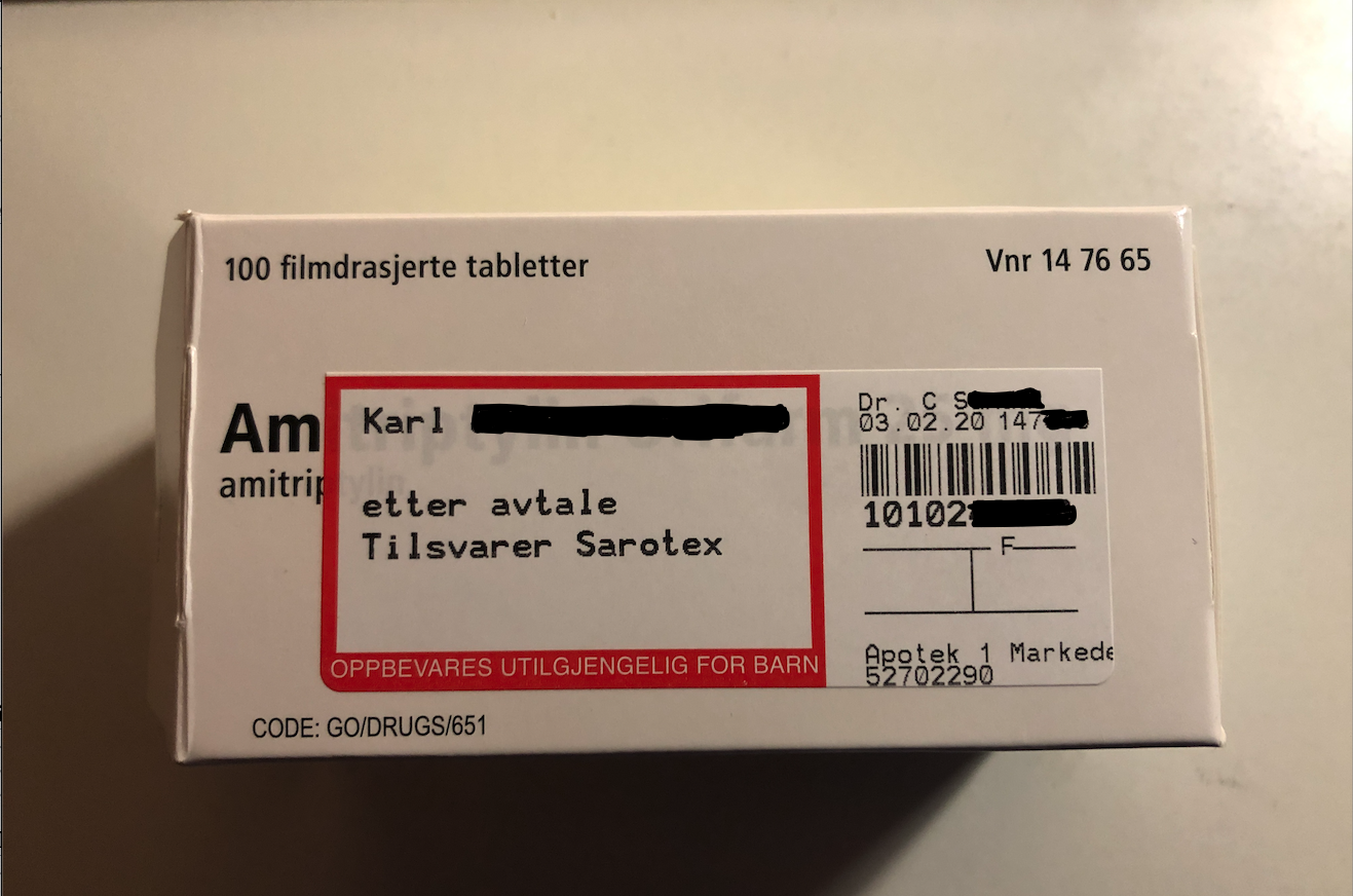 Legemiddel med etikett.